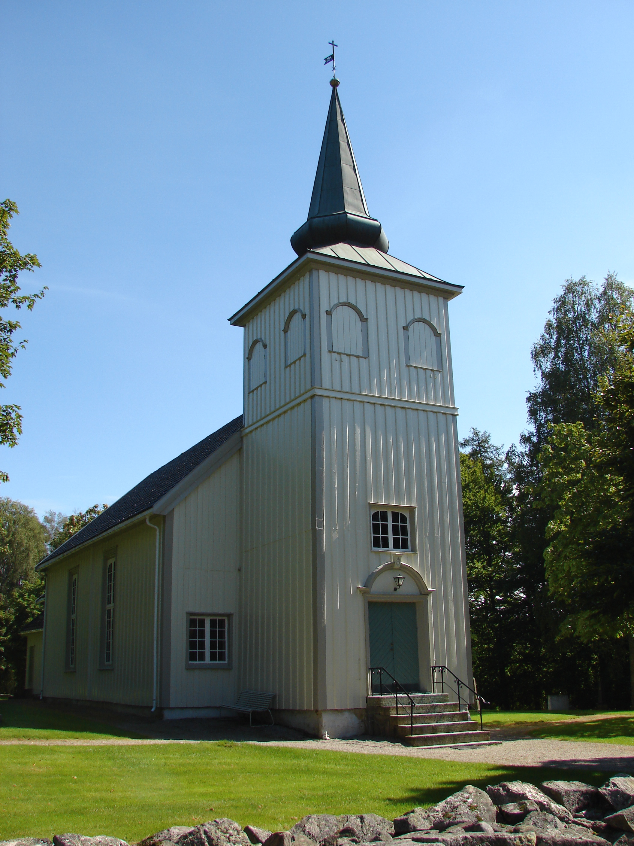 Solum kirke i Telemark